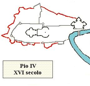 Rielaborazione personale effettuata con Paint (Microsoft) da un originale tratto da